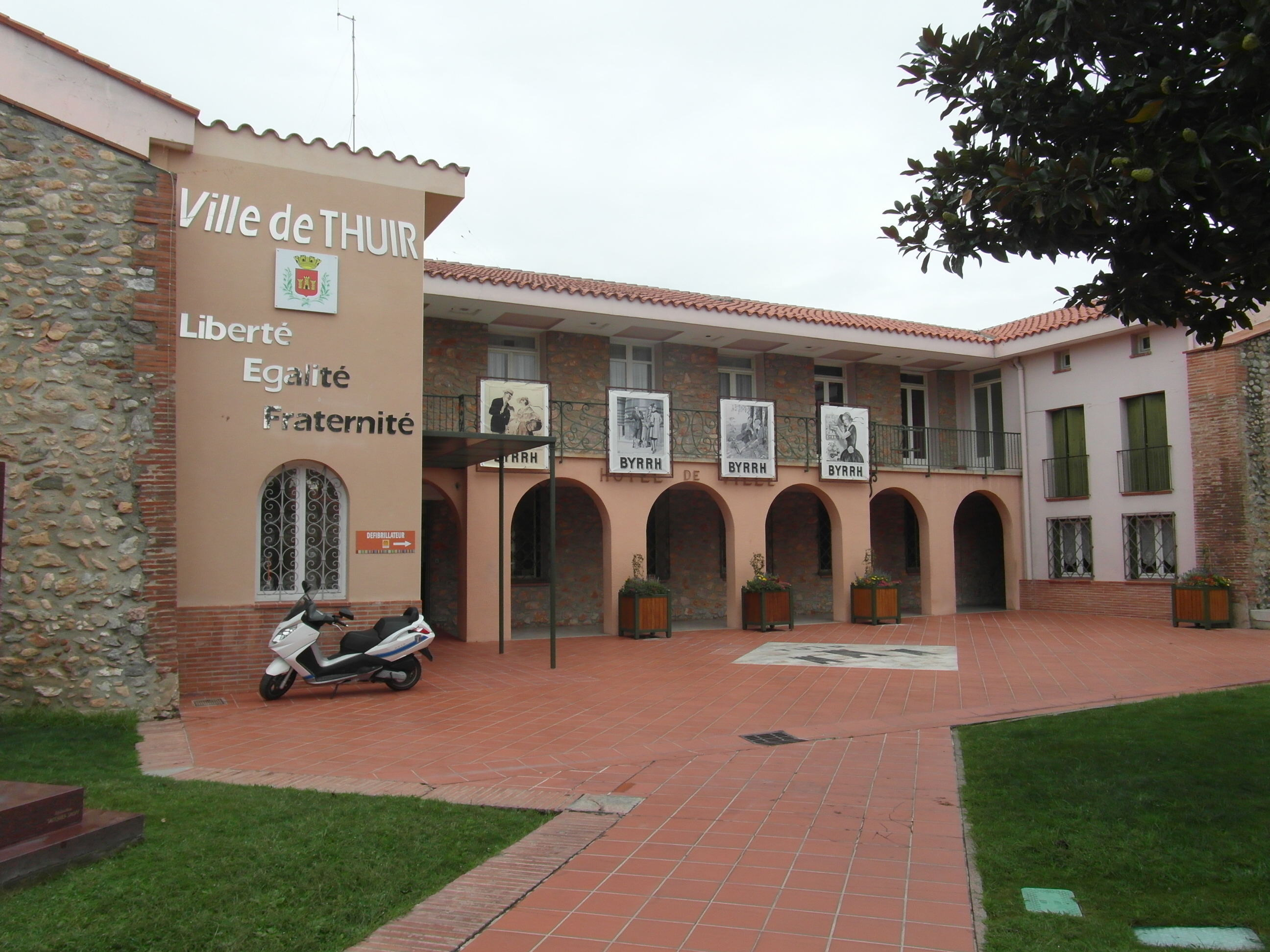 Mairie de Thuir